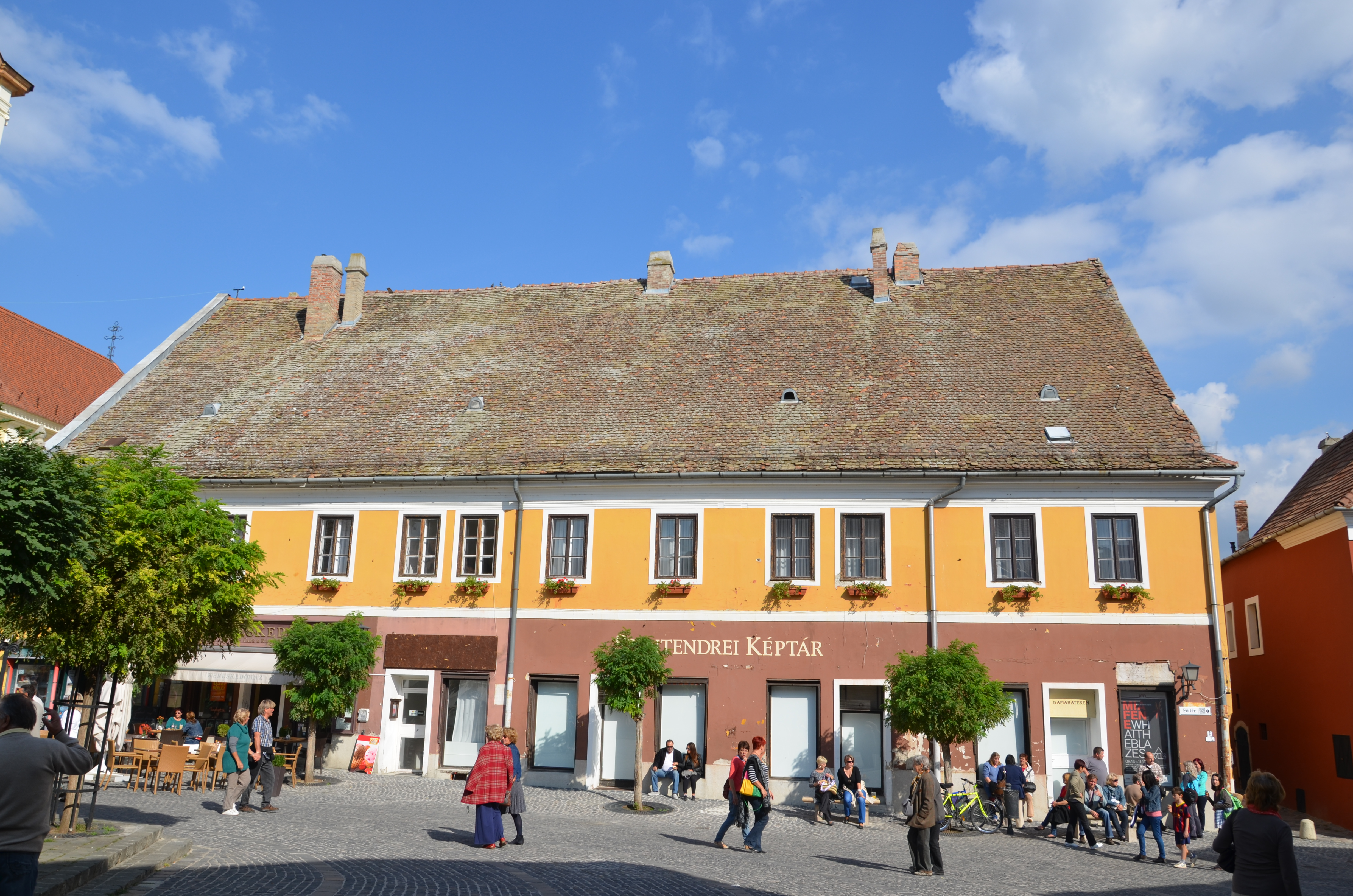 kereskedőházak This is a photo of a monument in Hungary. Identifier: 7353